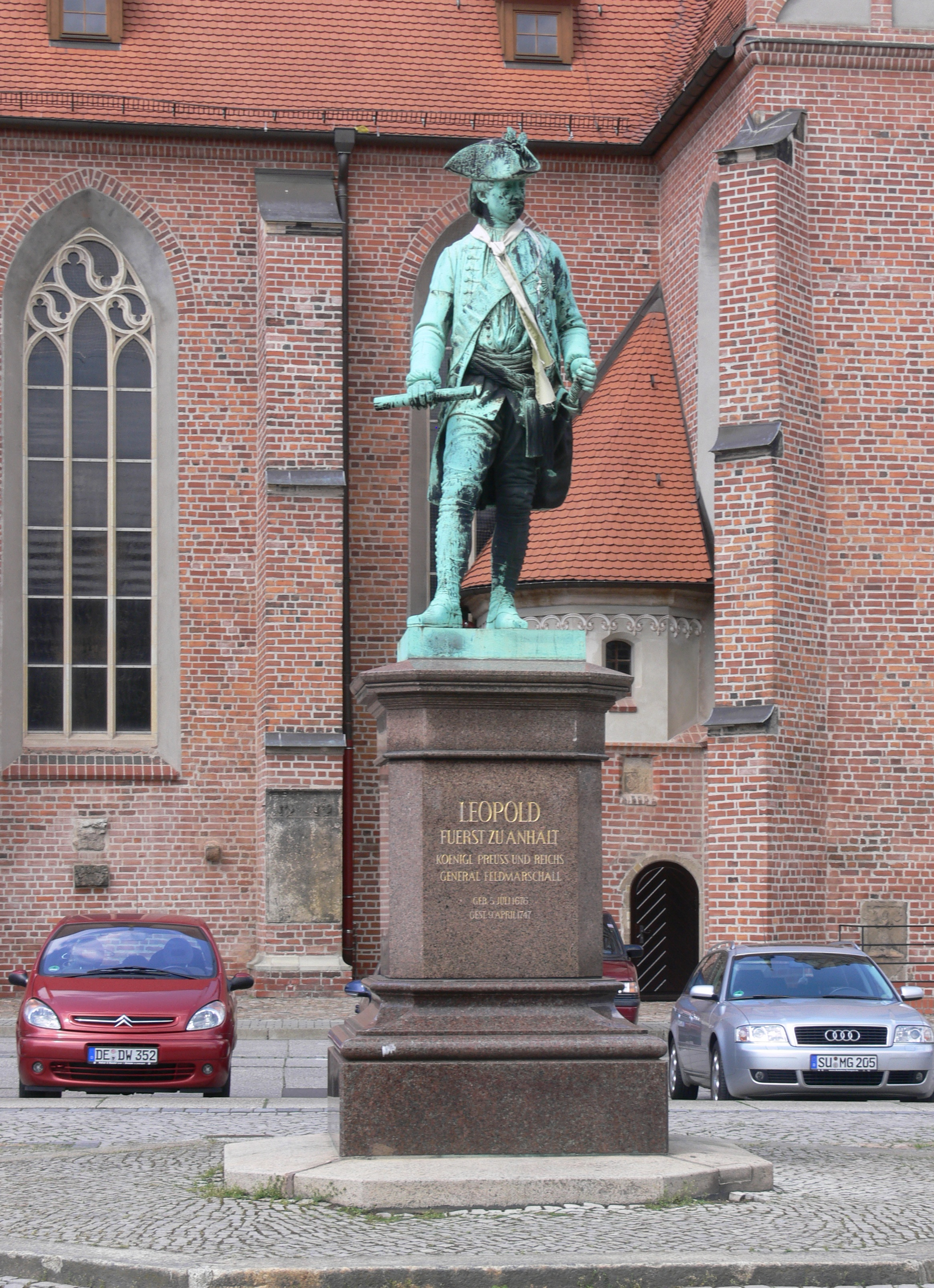 Dessau, Denkmal für Leopold I. von Anhalt-Dessau ("Der alte Dessauer") vor der Marienkirche; Denkmal von August Kiß nach dem Vorbild von Schadow im Lustgarten zu Berlin